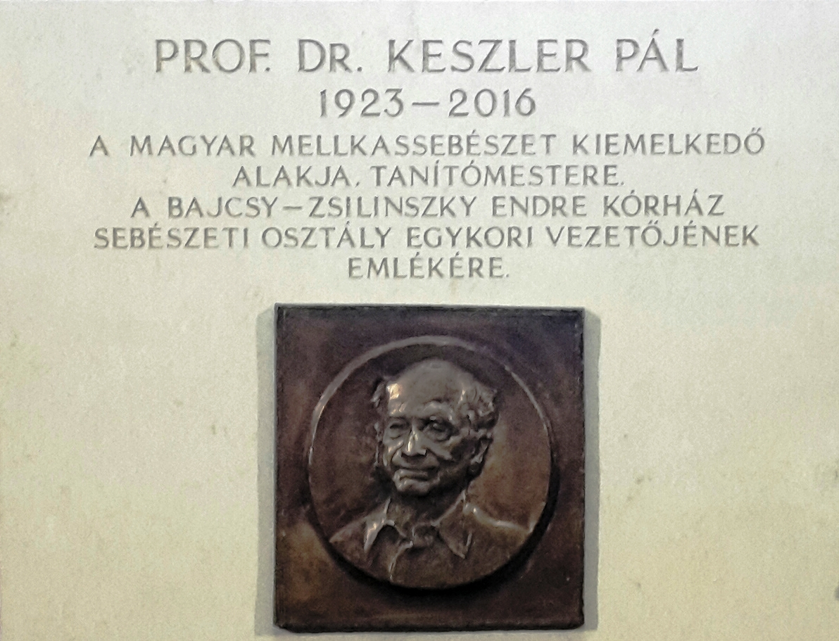 Keszler Pál (1923–2016) mellkassebész emléktáblája a Bajcsy-Zsilinszky Kórház A épületében